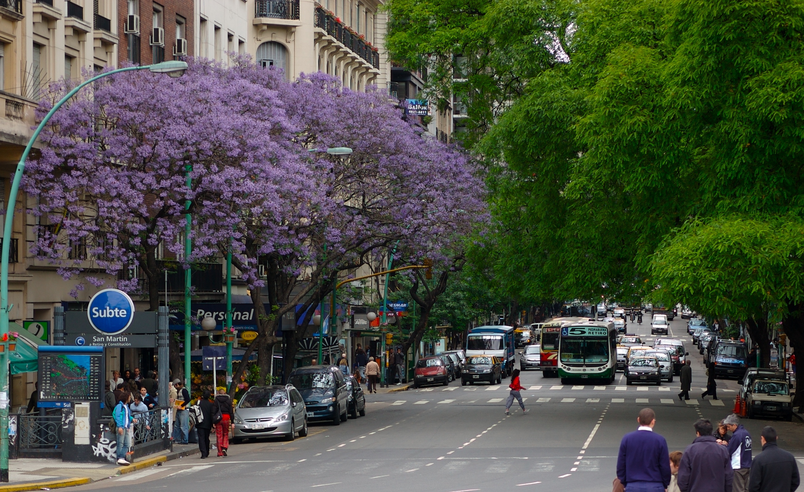 Jacarandás en Avenida Santa Fe, entre Maiù y Esmeralda, Buenos Aires, Argentina.